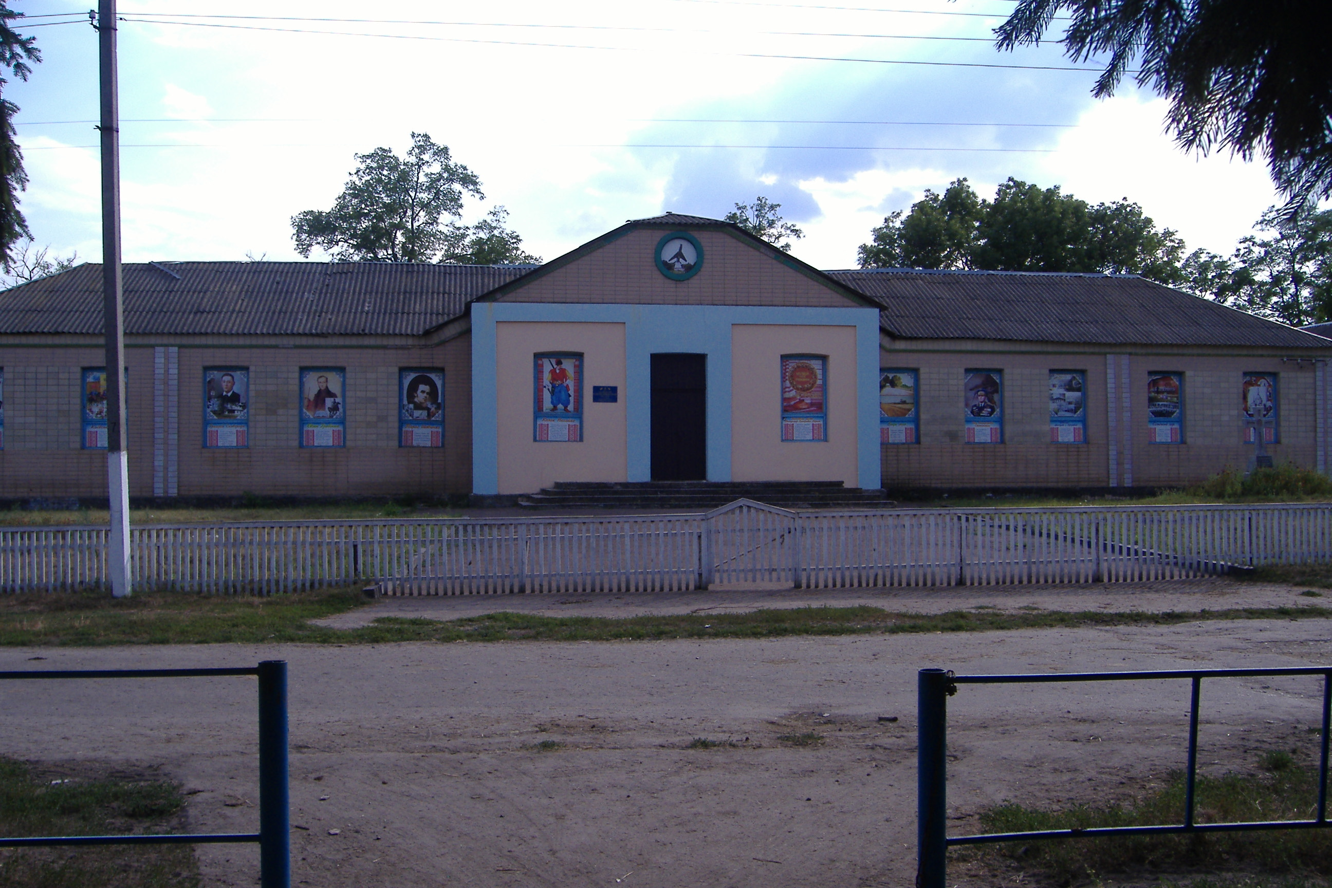 Знаходиться в с. Нехайки, Драбівський р-н, Черкаська обл. Експозиція музею розміщена в 11 залах, в яких розповідається про історію рідного краю від давно минулих часів до сьогодення.